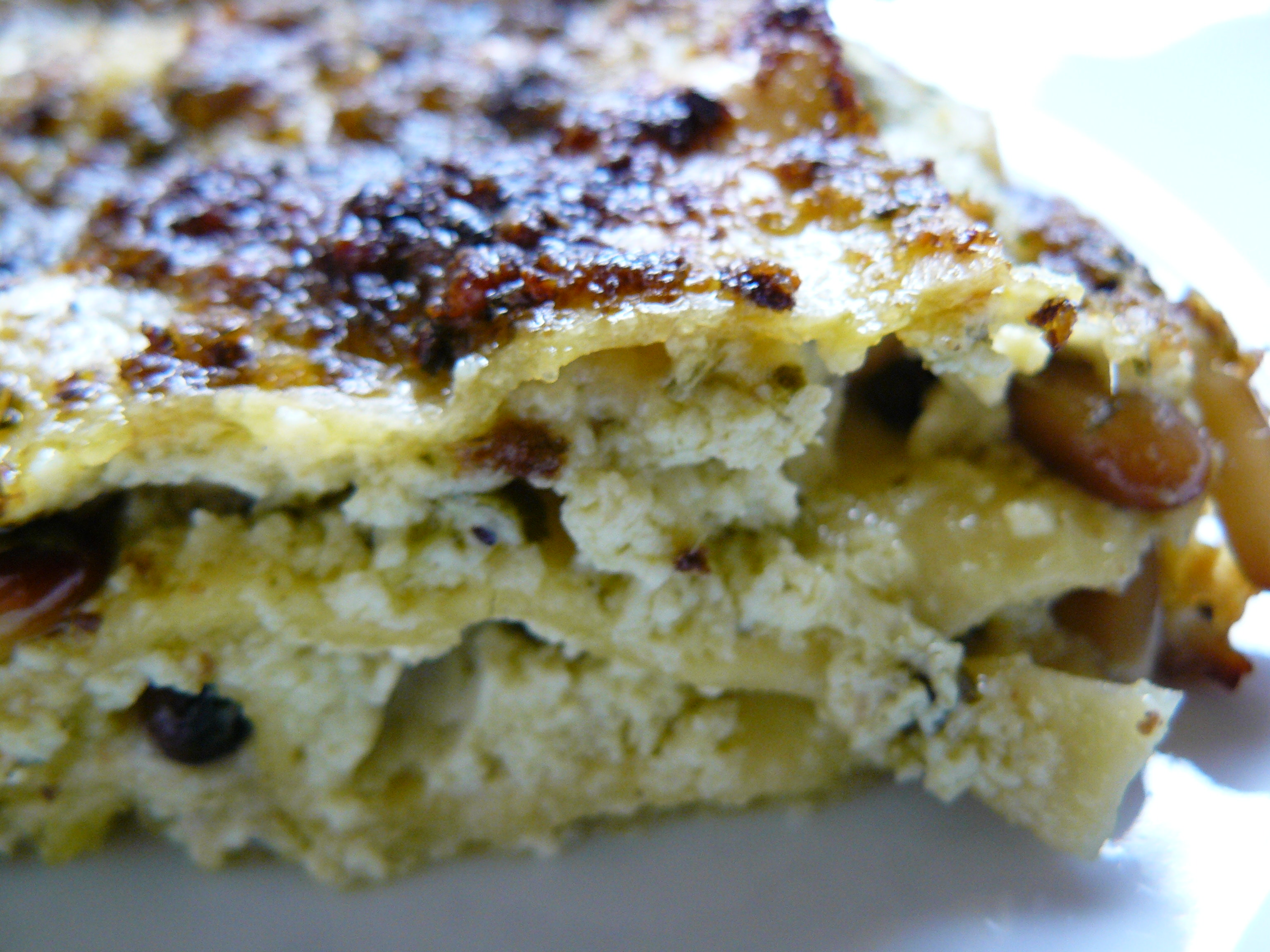 Cette recette est tellement bonne que nous avons même fait une vidéo pour vous inciter à la faire... Un classique contourné qui devient vite incontournable !!! La cuisine italienne est l'une des meilleure au monde ! et mon ami Franco ne me contrediras pas...